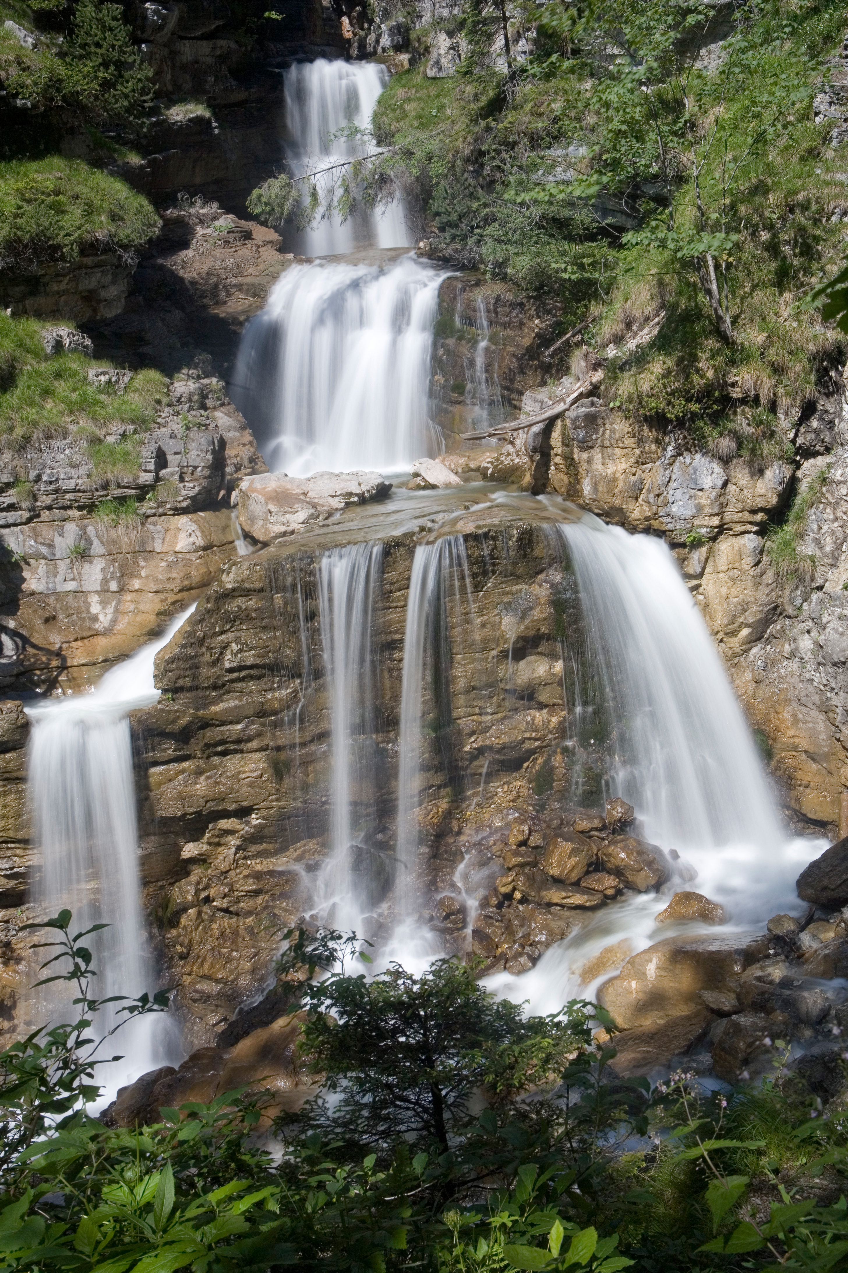 Einer der Kuhfluchtwasserfälle